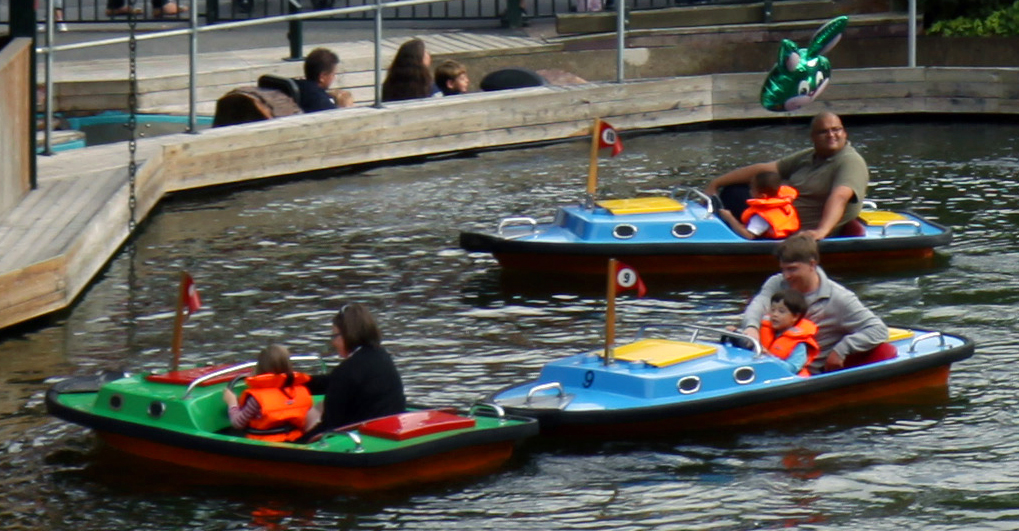 Barnbåtarna på Liseberg i juli 2009.